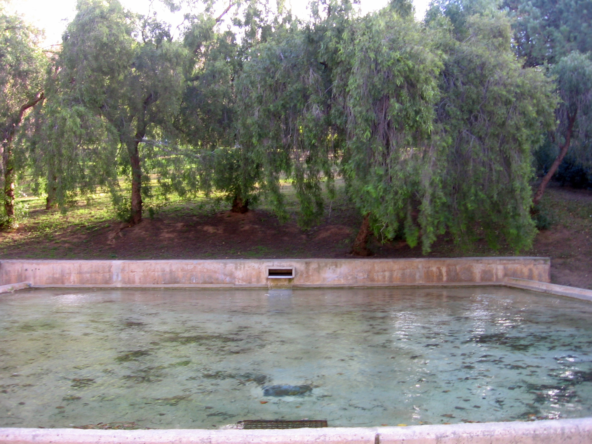 Parque de la Font Florida.